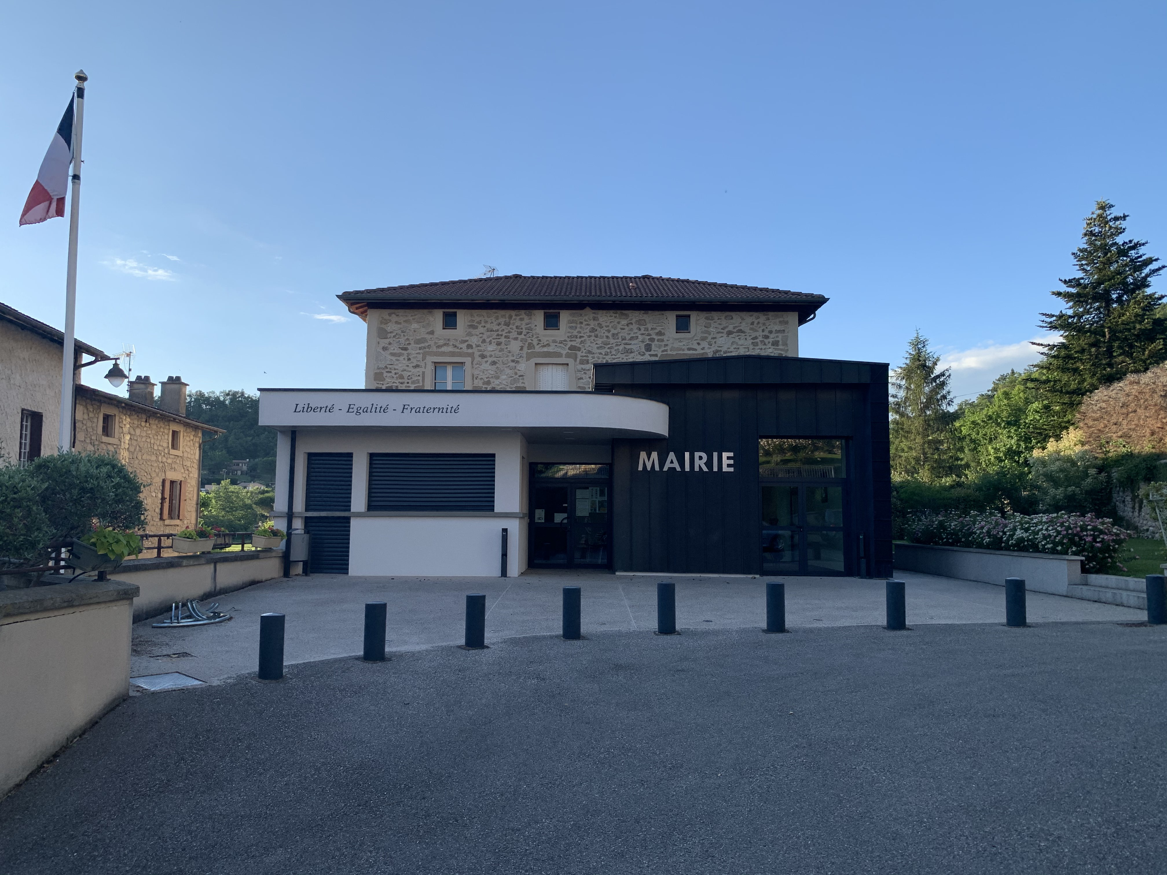 Photo de la nouvelle Mairie du village de Beauregard-Baret et Meymans